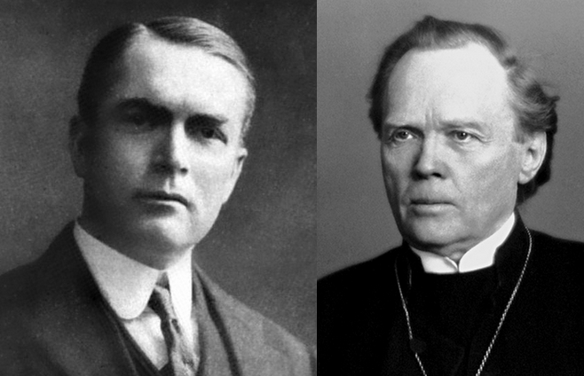 Photos de John Raleigh Mott et Nathan Söderblom, prix Nobel de la Paix (1946 et 1930)